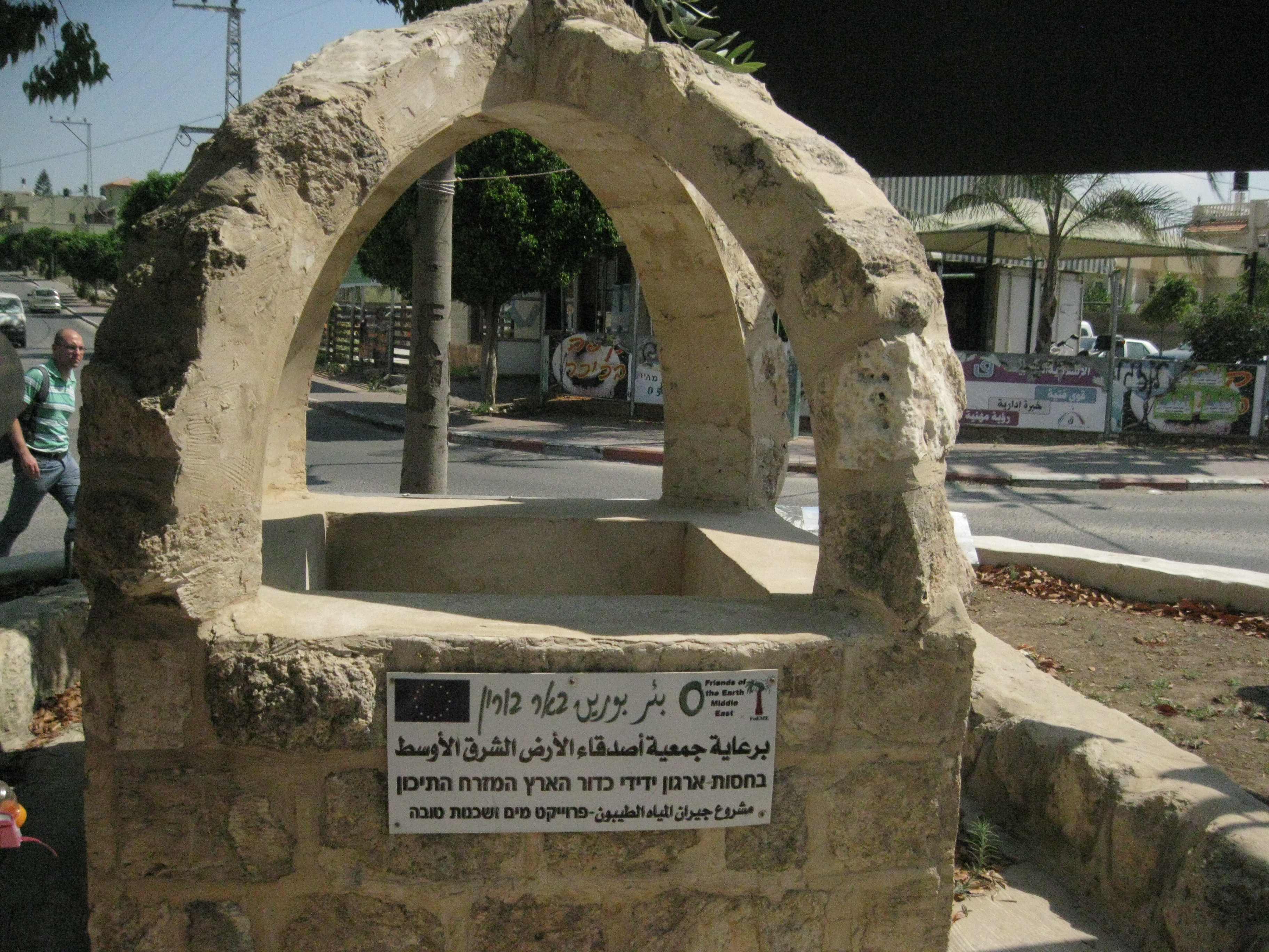 באקה אל-גרבייה